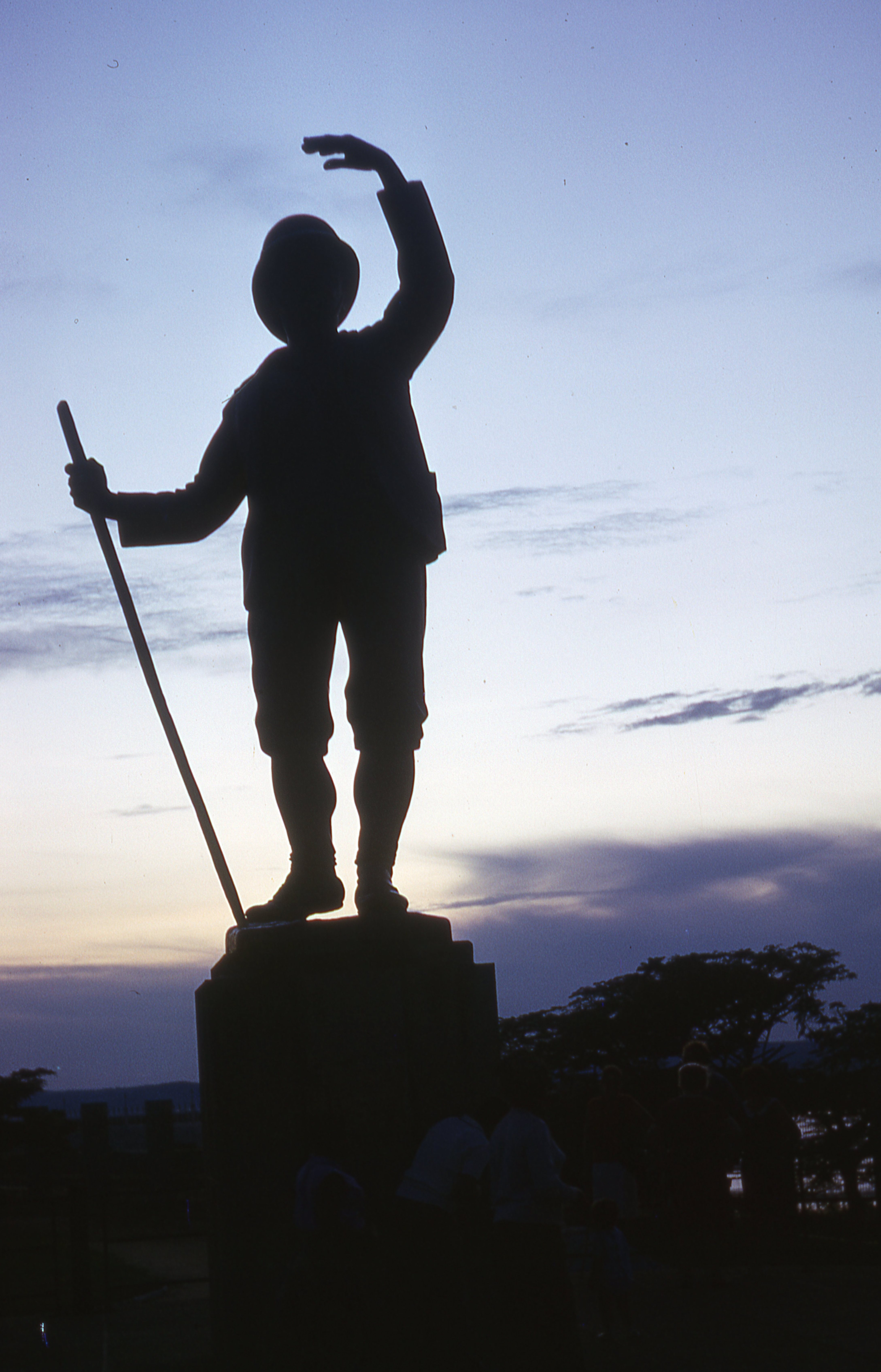 La photo date de 1967. La statue a été retirée quelque temps plus tard selon David Van Reybrouck, Congo (p. 99).